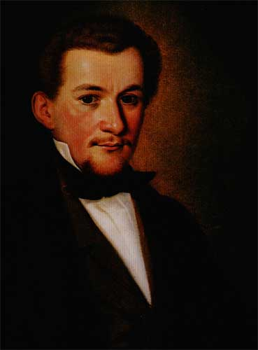 Heinrich August Papellier (* 18. August 1834; † 11. Dezember 1894), Bürgermeister von Erlangen